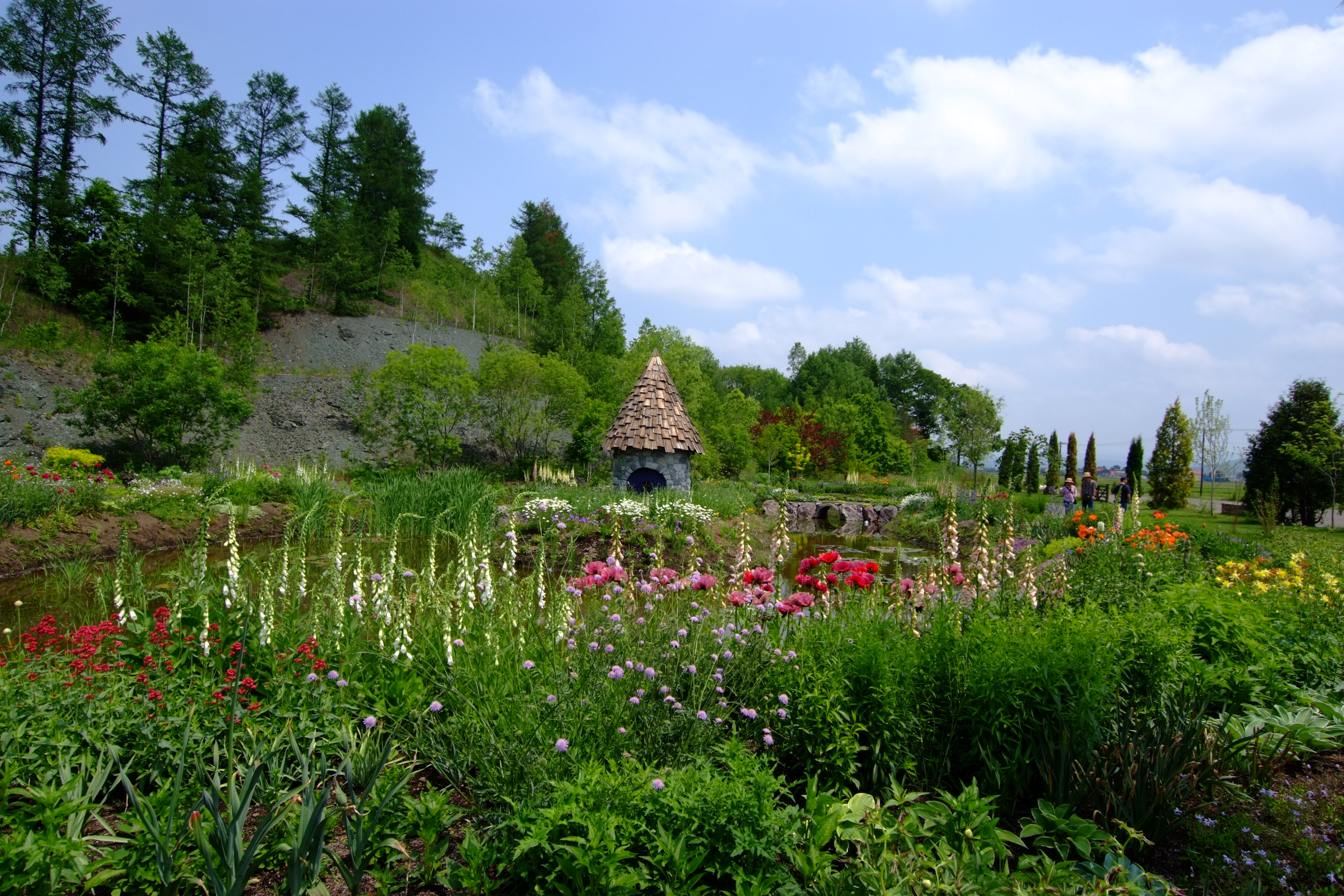 上野ファーム（UENO FARM）